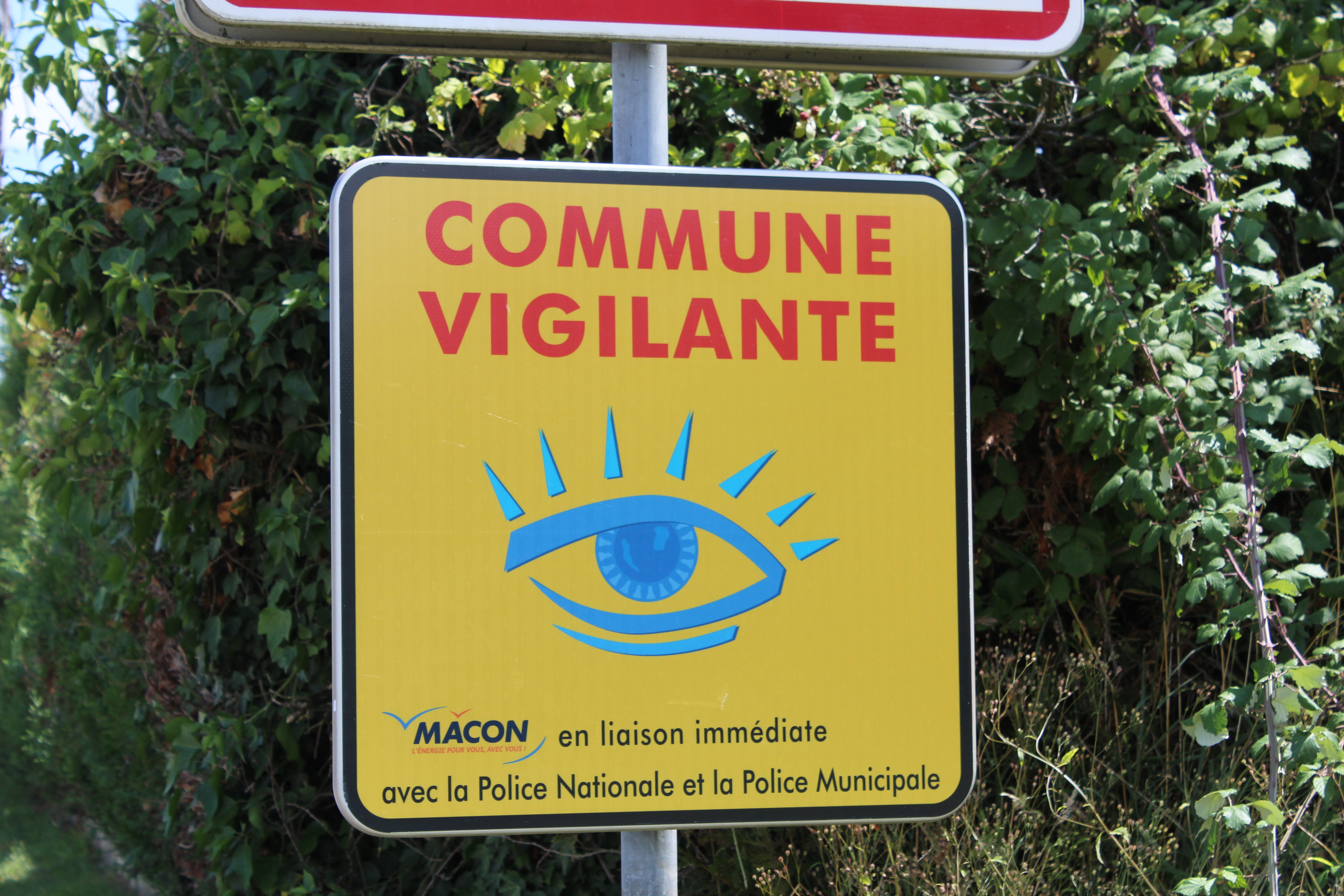 Panneau indiquant que Saint-Jean-le-Priche participe au dispositif Commune vigilante.